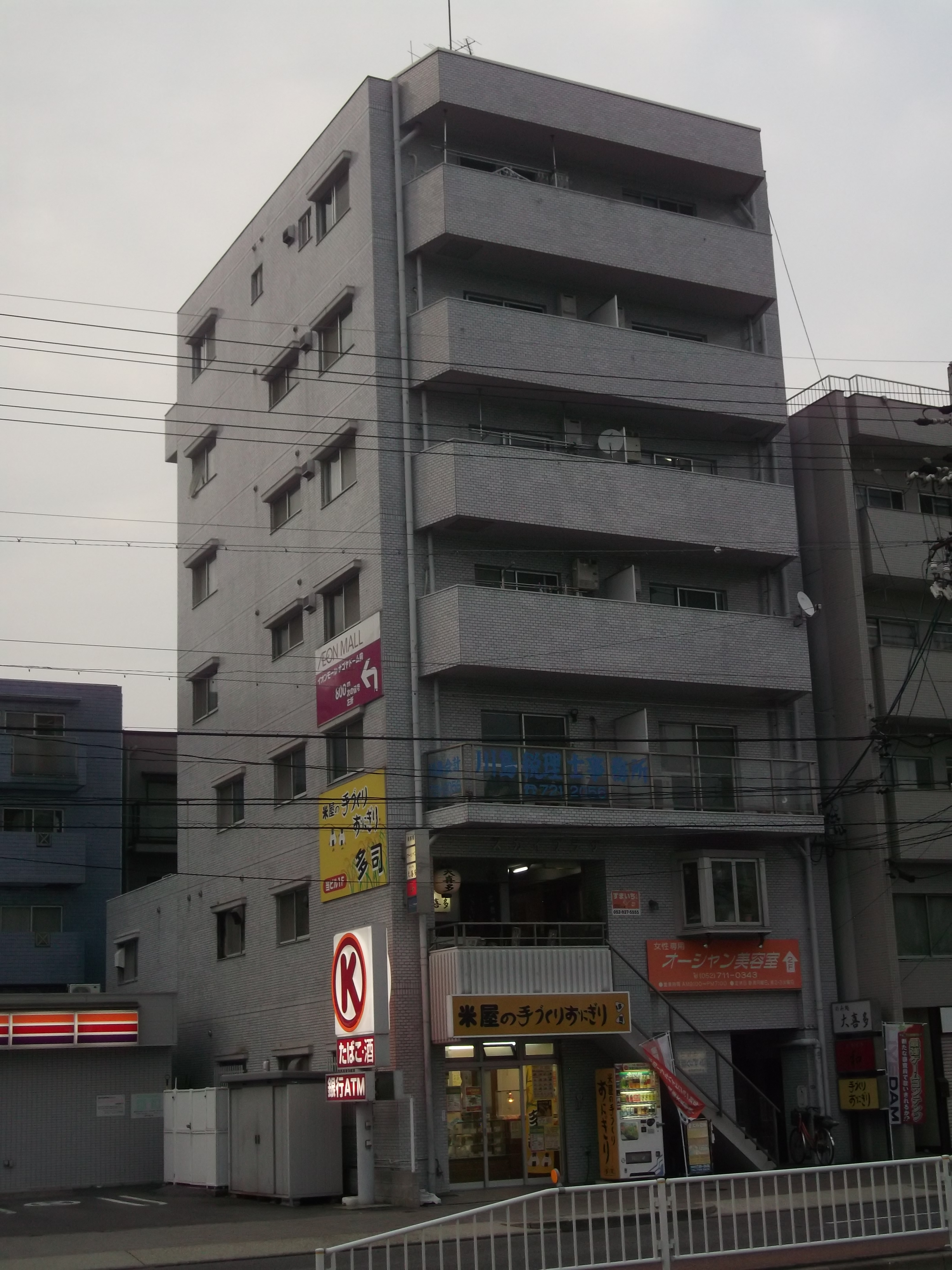 名古屋市東区出来町の多司本社が入居していたビルを南側公道西側より写す